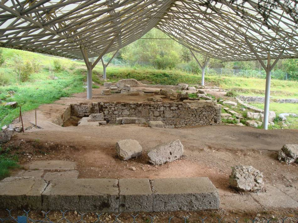 Site archéologique romain de Villards-d'Héria (Jura). La protection du site a été assurée par des couvertures à deux versants constituées d’un système métallo-textile associant une structure tridimensionnelle à un textile téflonisé. L’utilisation du téflon en couverture tendue sur la structure en métal et la douceur de sa teinte, laissant passer la lumière, créent des conditions favorables pour les visiteurs. Des écrans végétaux réduisent les effets du vent et les couloirs de congères.